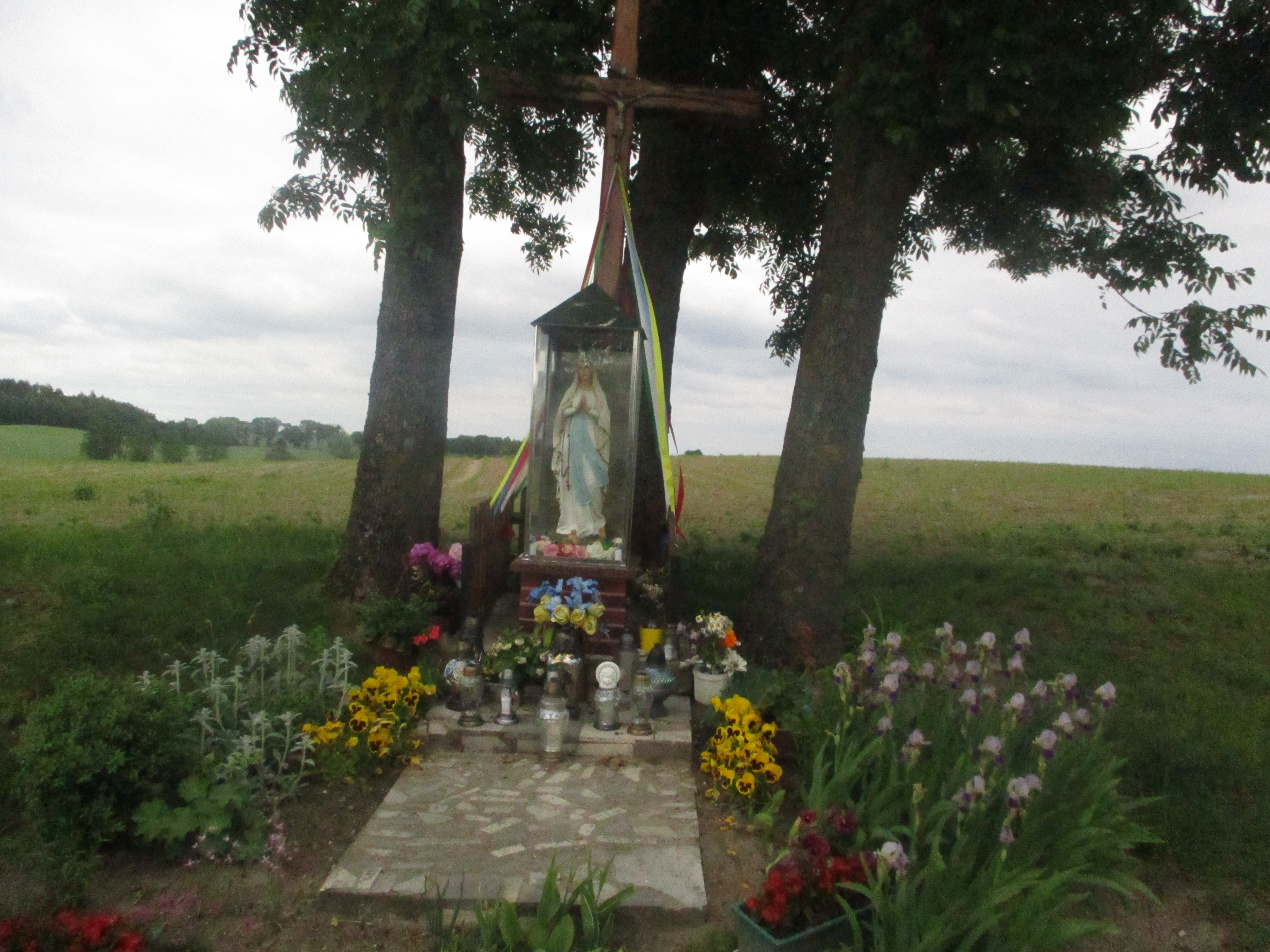 To druga kapliczka w Partęczynach